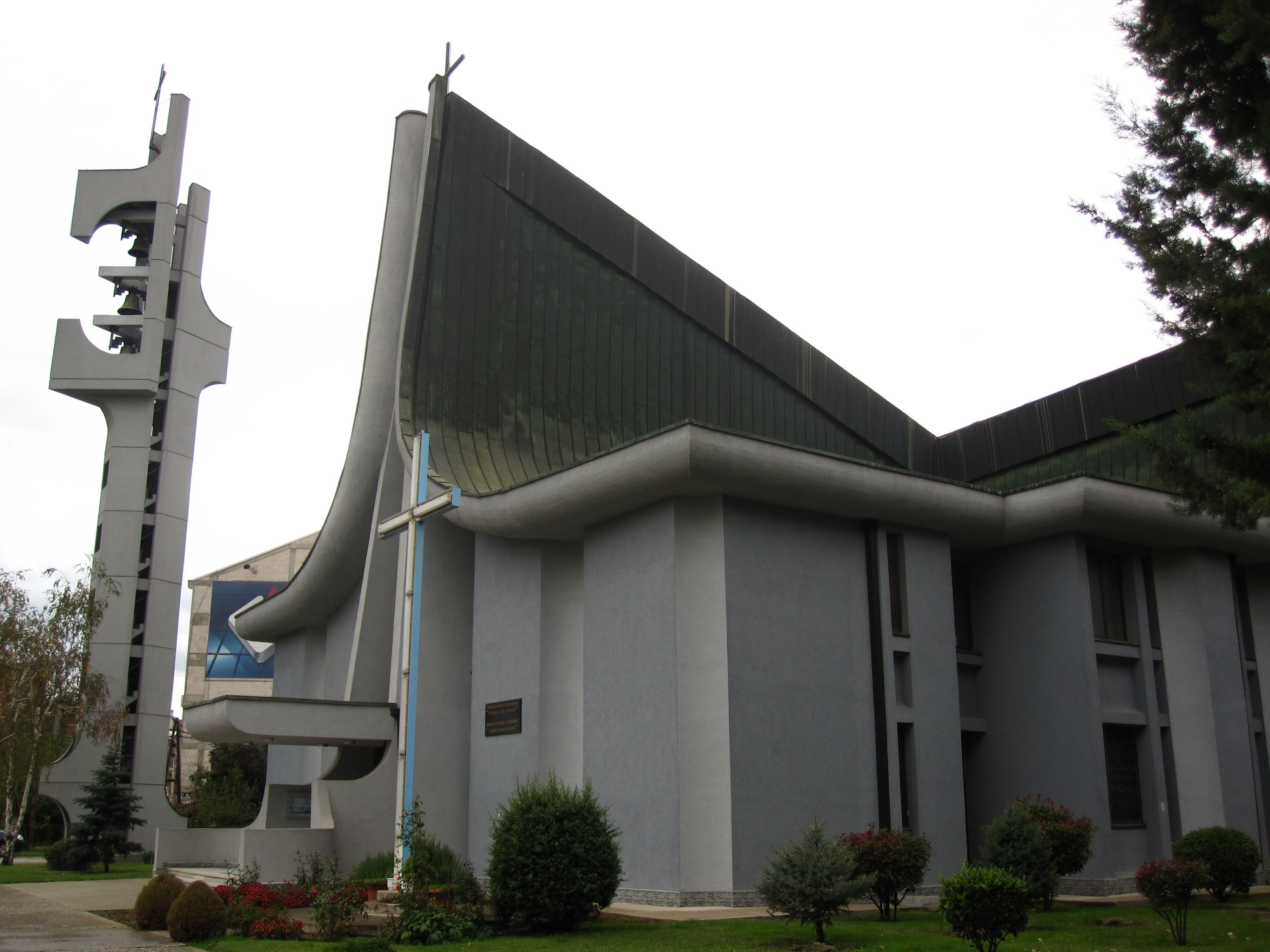 Римокатоличка катедрала - Скопје.